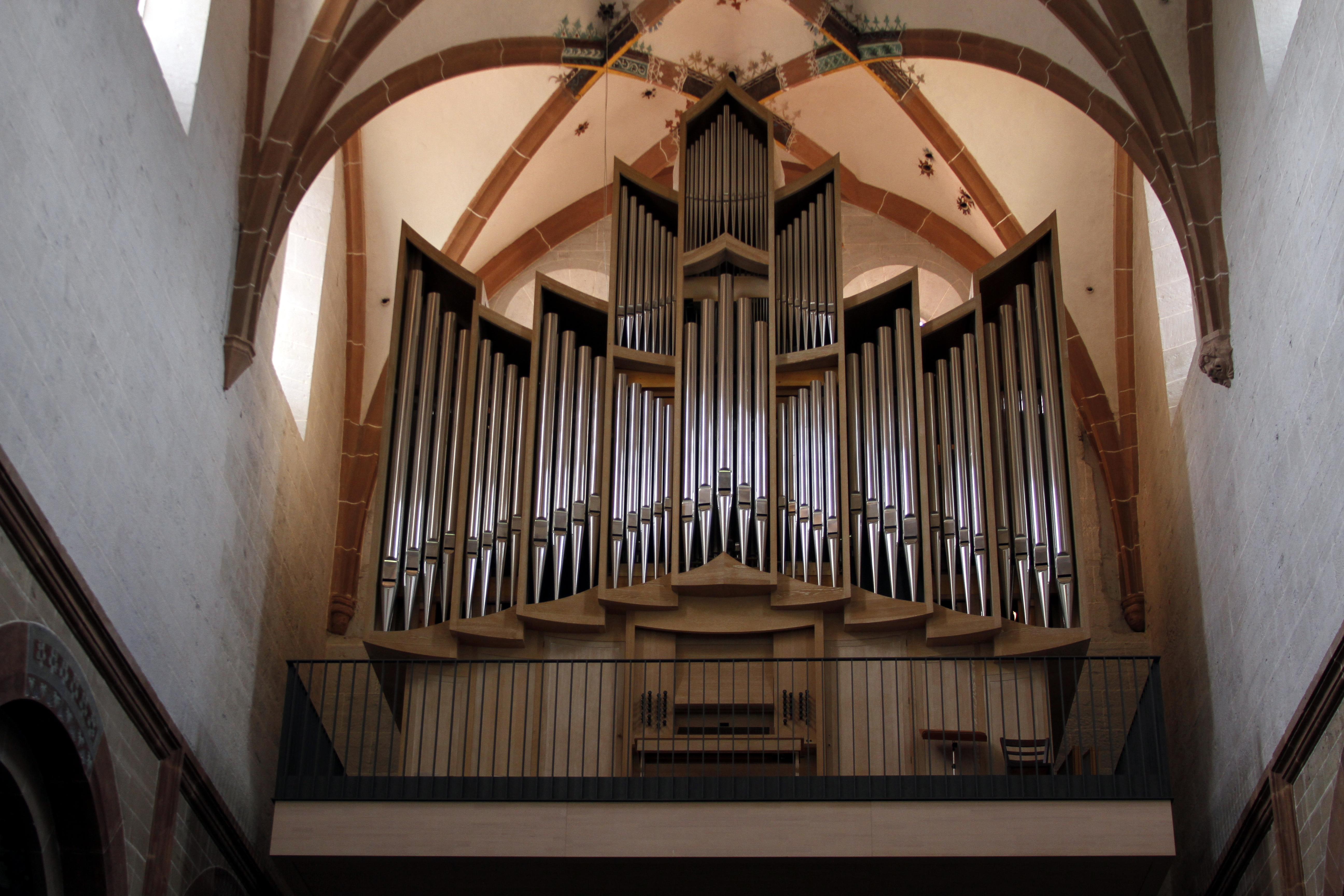 Laymen's church - Maulbronn Monastery - Maulbronn - Germany